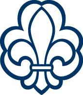 DDS logo